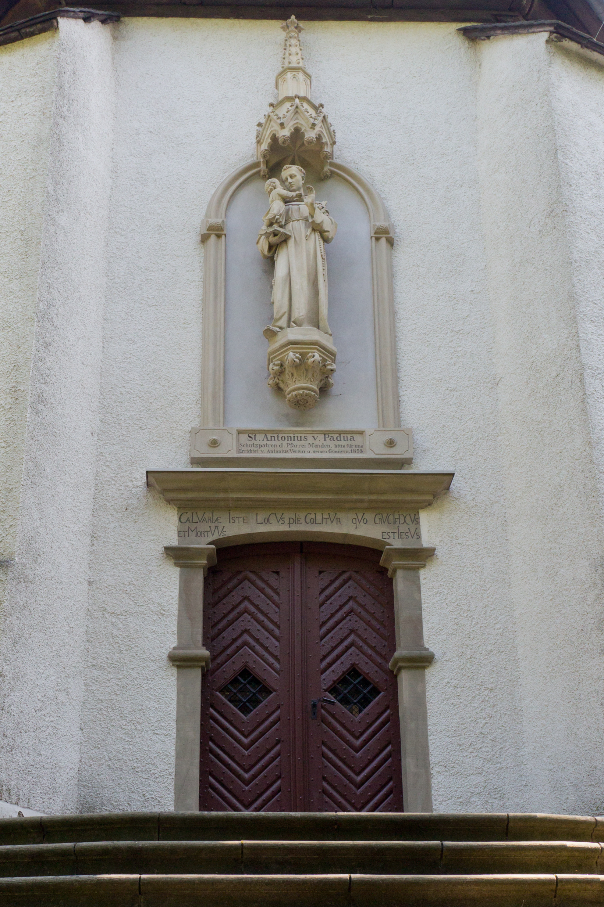 Eingang der Kapelle St. Antonius auf dem Rodenberg in Menden (Sauerland)This is a photograph of an architectural monument., no. 115